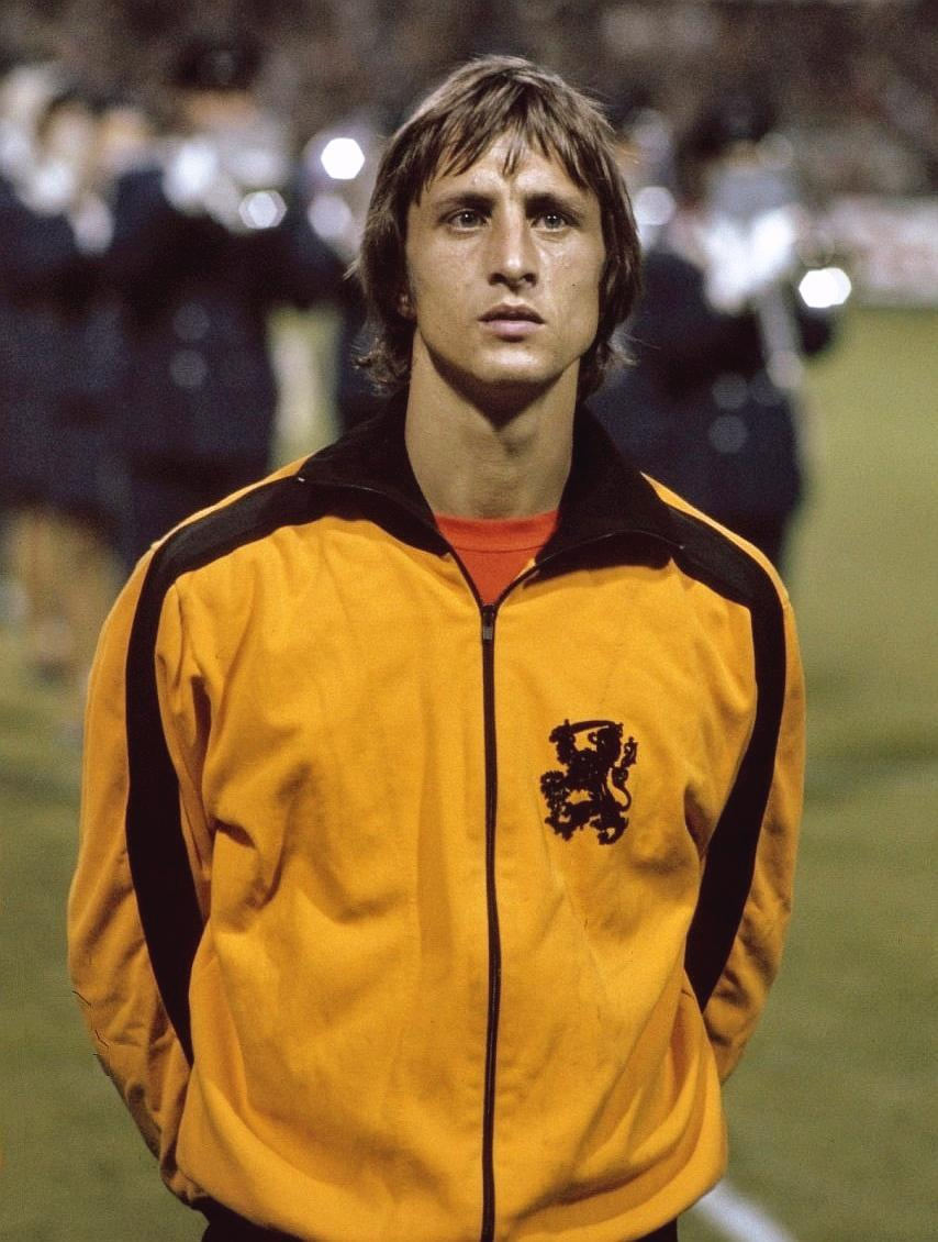 Johan Cruyff in trainingspak Nederlands Elftal, kop